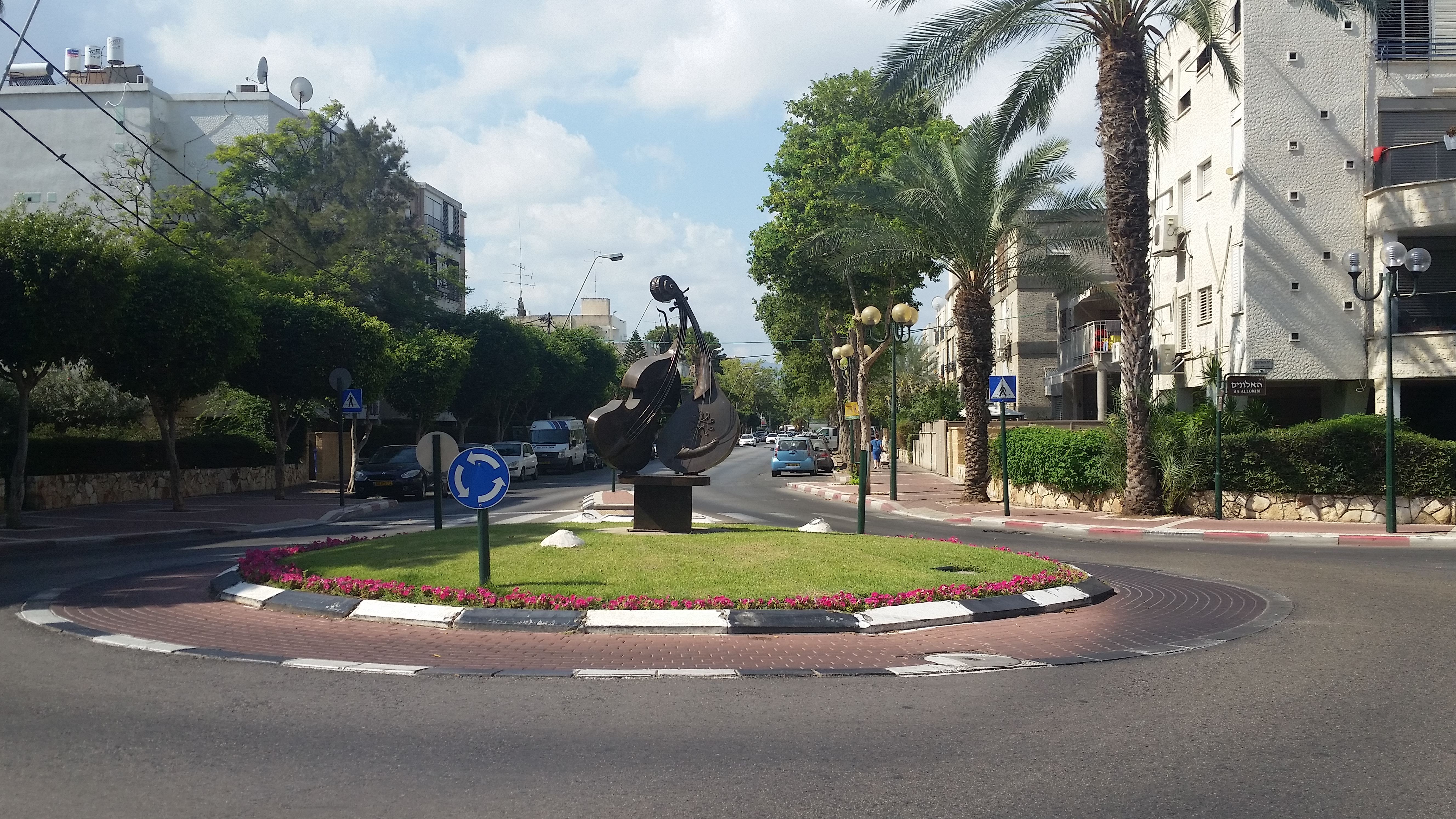 כיכר בשכונת סביניה, פינת קרן היסוד ורחוב ניצנים ליד המרכז המסחרי